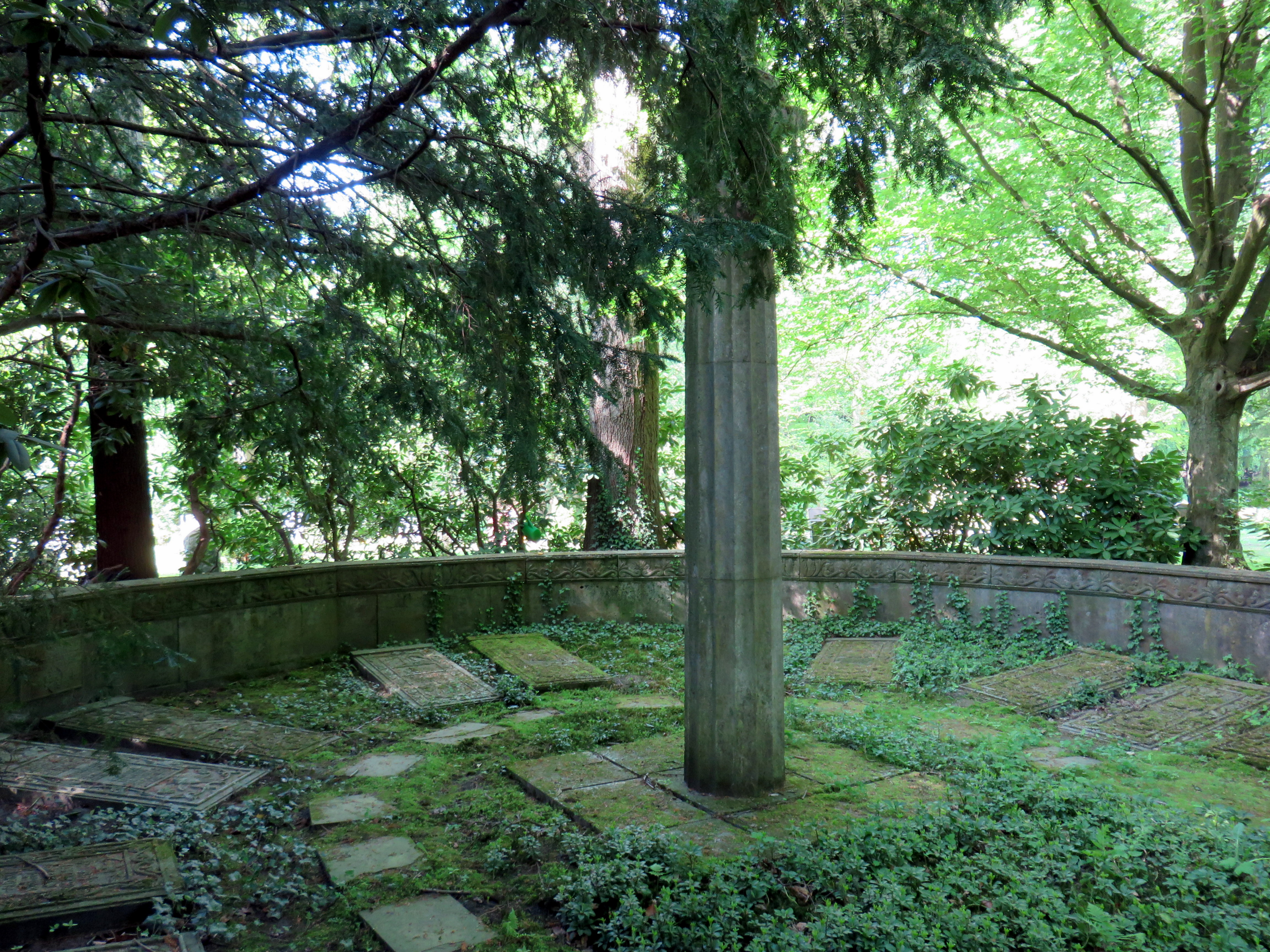 Rondeelartige Großgrabanlage für Mitglieder der Familie Münchmeyer auf dem Ohlsdorfer Friedhof in Hamburg, 1920 vom deutschen Architekten Carl G. Bensel geschaffen mit zentraler dorischer Säule, gekrönt von einer Frauenskulptur, wahrscheinlich vom deutschen Bildhauer Oscar (Oskar) Ulmer. Grabplatten-Lage bekannter Familienmitglieder.